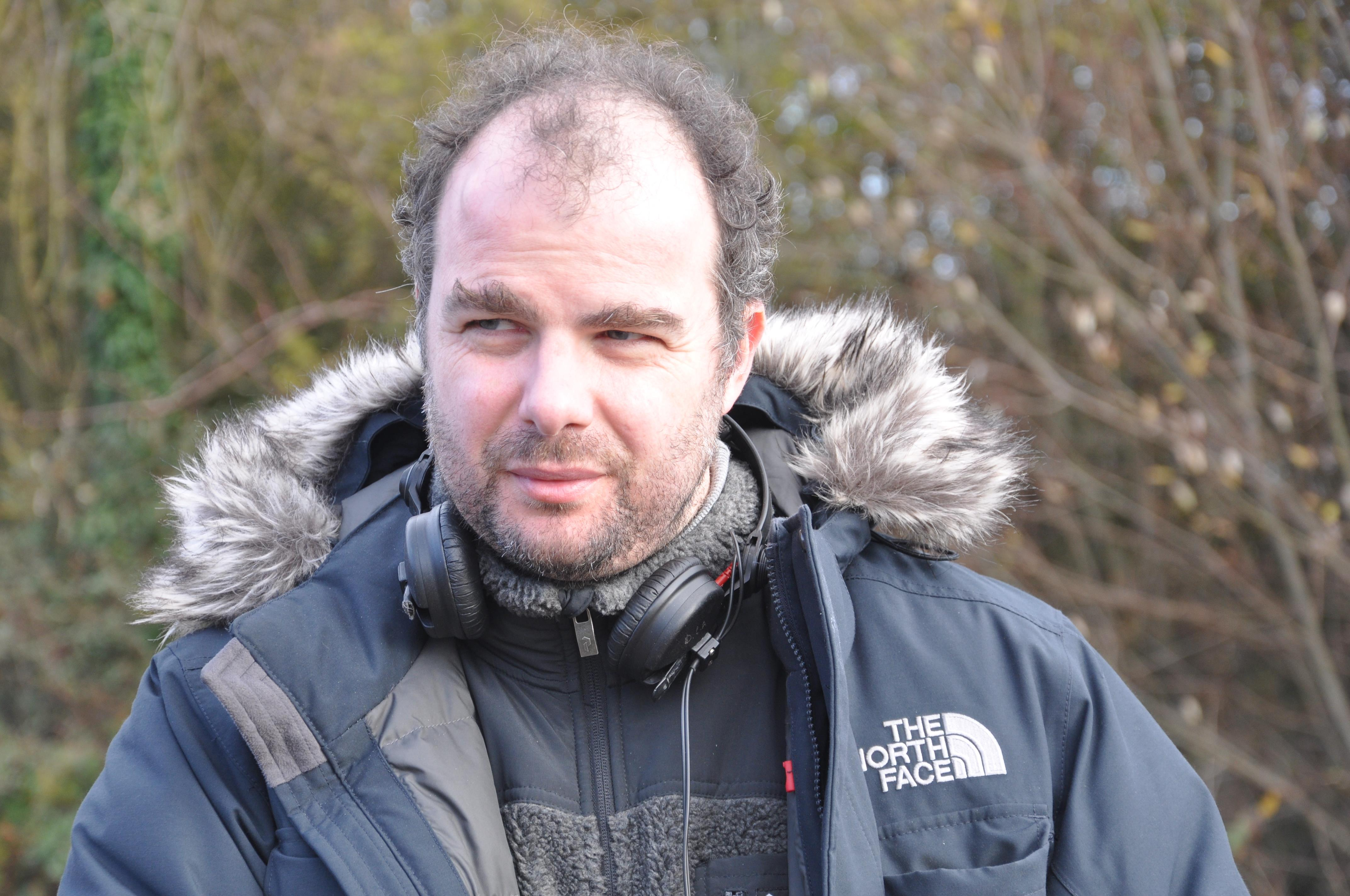 Cédric Anger sur le tournage du filme ' la procahine fois je viserai les coeur ', avec Guillaume Canet